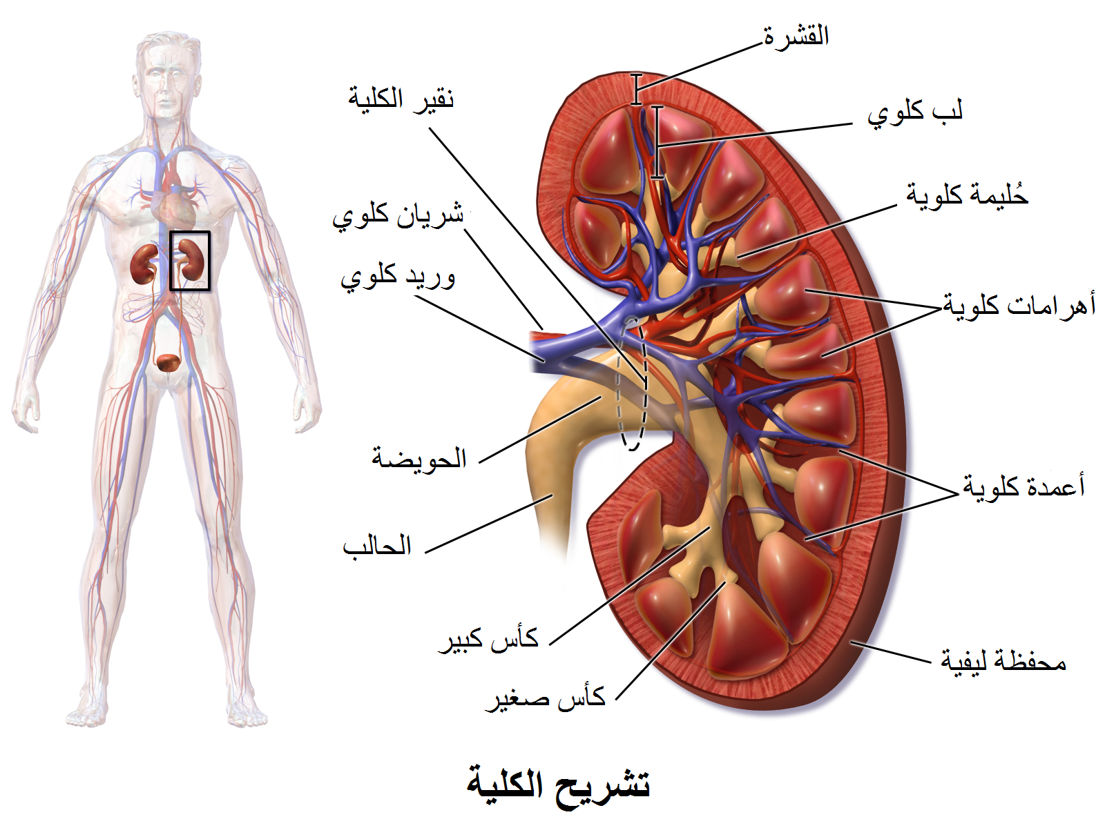 تشريح كلية الإنسان